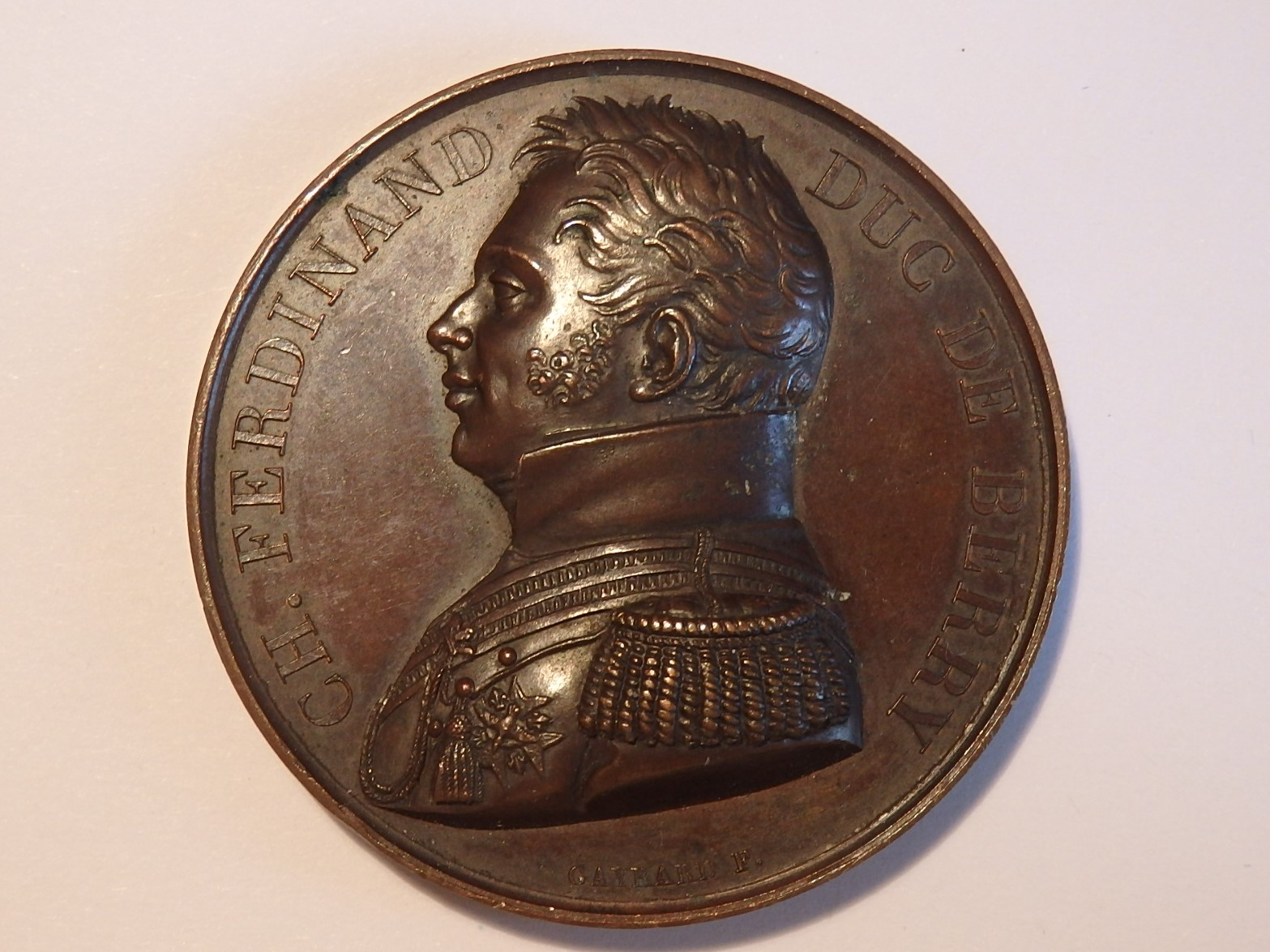 Medaille auf die Ermordung de Berrys im Jahr 1820, Porträtseite